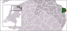 Locatie van Nieuweschans aangegeven binnen de voormalige gemeente Reiderland.